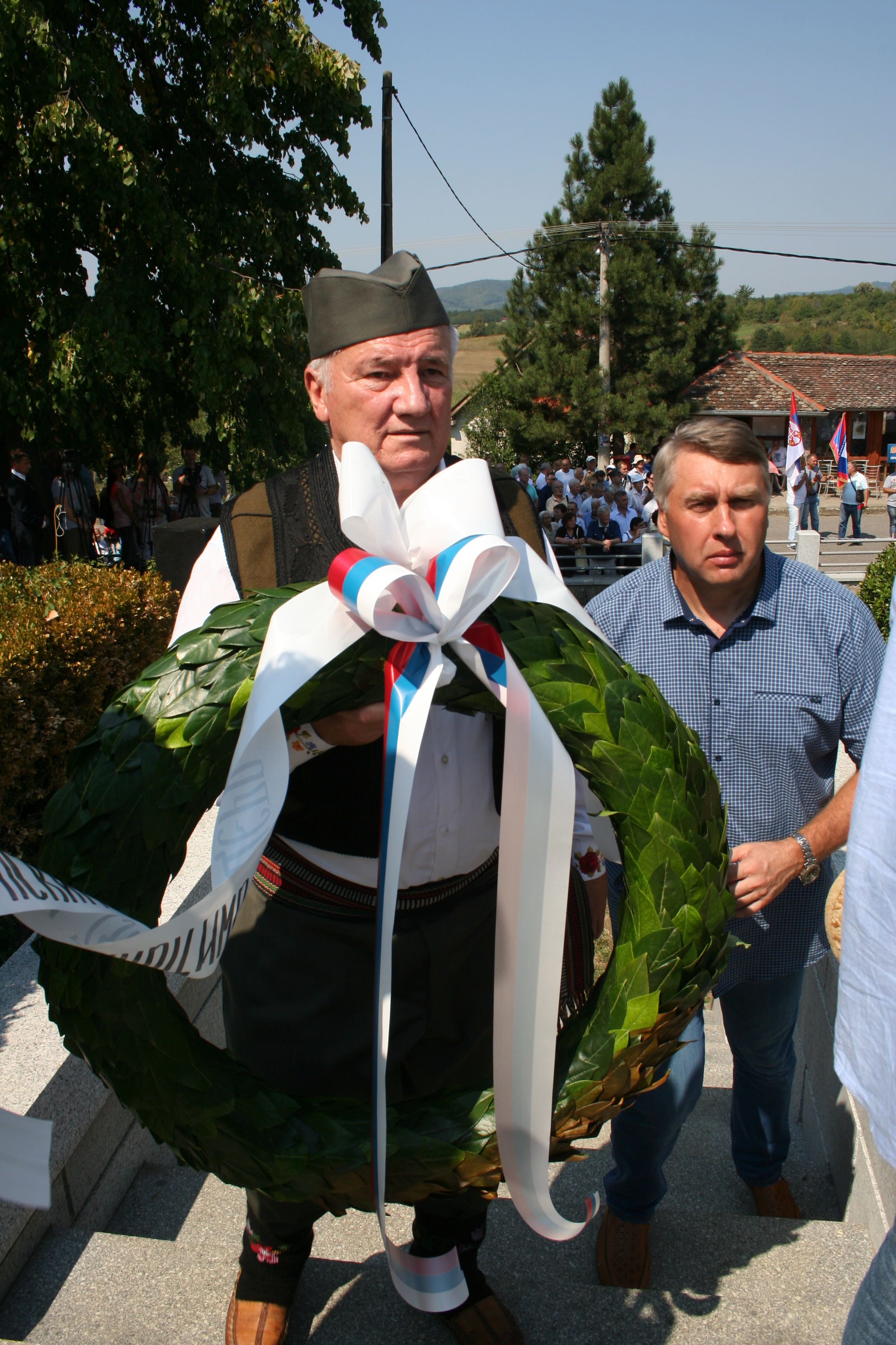 Državna proslava 103. godišnjice Cerske bitke, 2017. Tekeriš